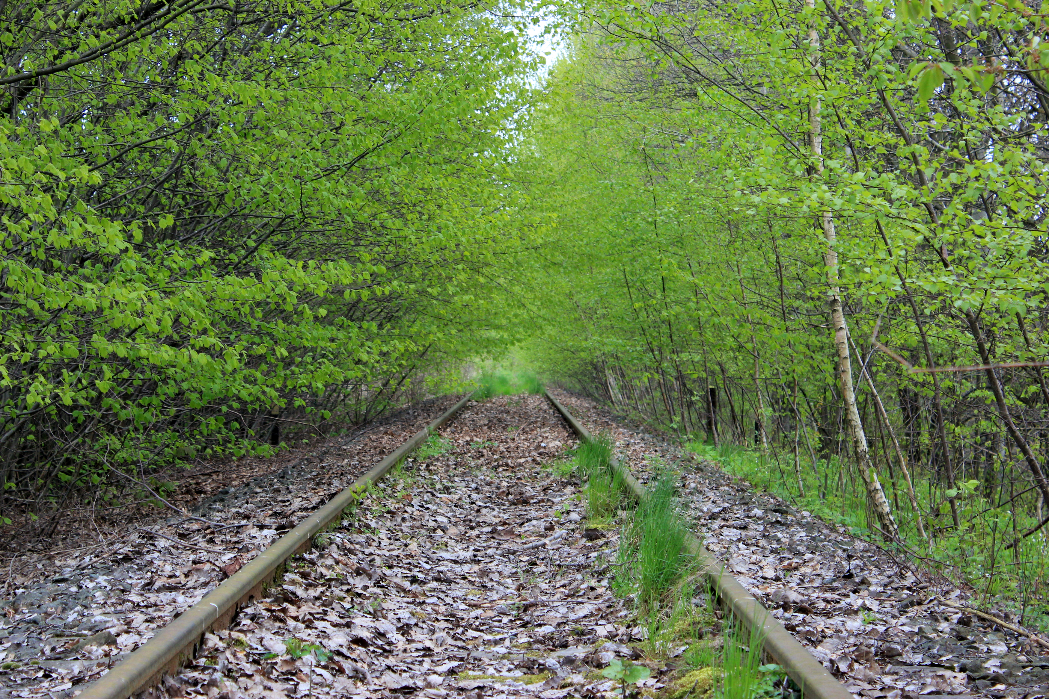 Hornjoserbsce: Železniska čara Budyšin–Wjelećin blisko Rozwodec.